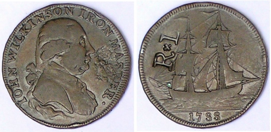 Toegangspenning Engelse scheepswerf. Foto van eigen exemplaar.